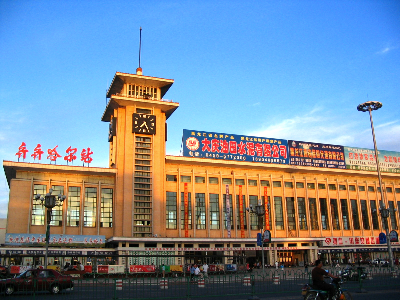 齐齐哈尔火车站 QQ:696847